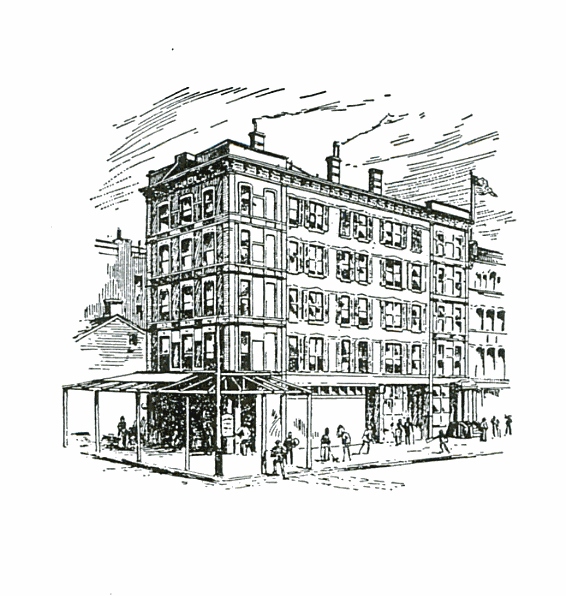 Edifício onde Blavatsky e Olcott mantinham um apartamento, em Nova Iorque, na rua 47 nº 302